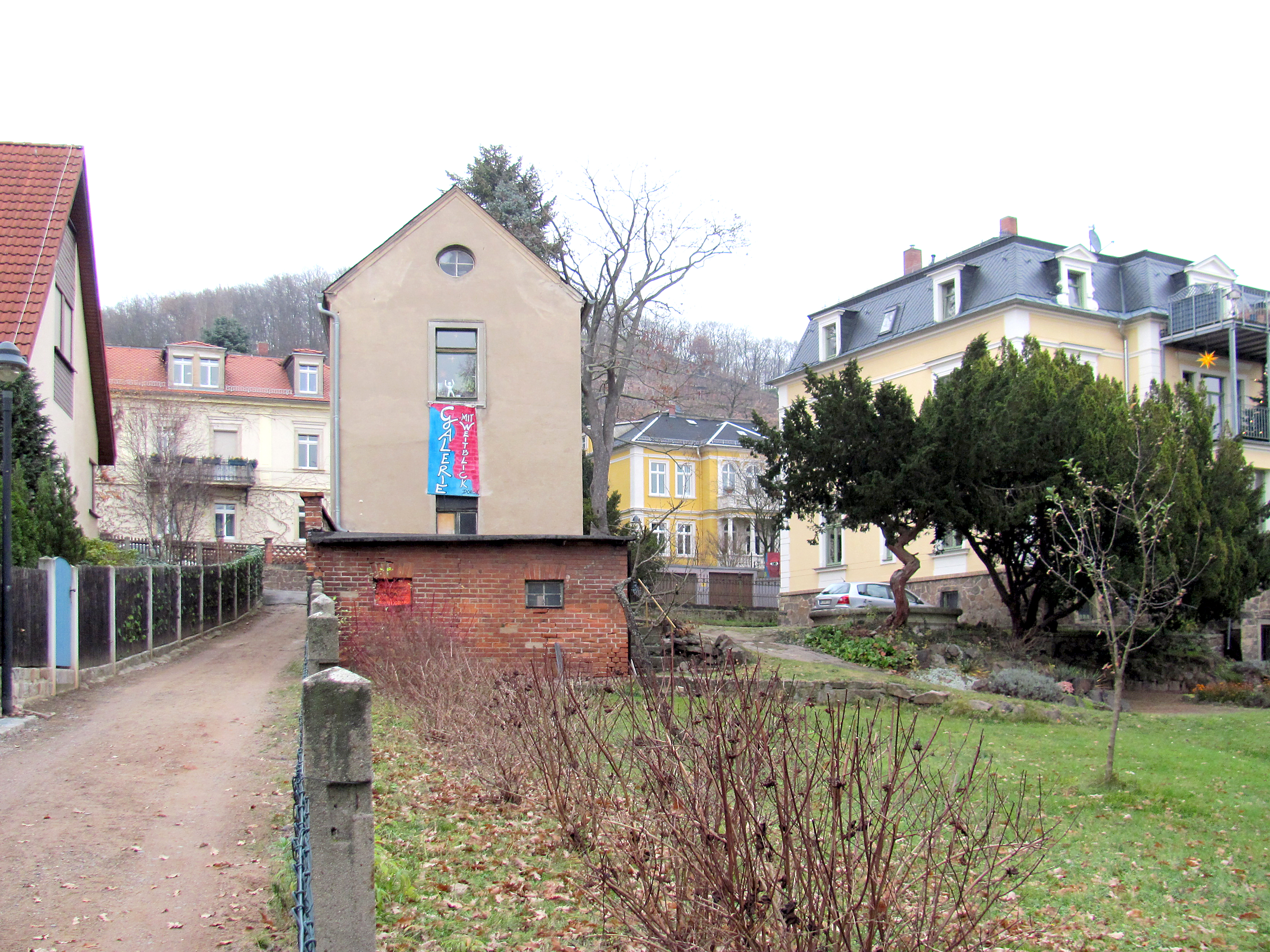 Radebeul-Niederlößnitz, Mietvilla Carl Semper, Ziegelschuppen und Remisengebäude von hinten. Auf der anderen Straßenseite links das Wohnhaus Finstere Gasse 2, rechts Villa Dorothee